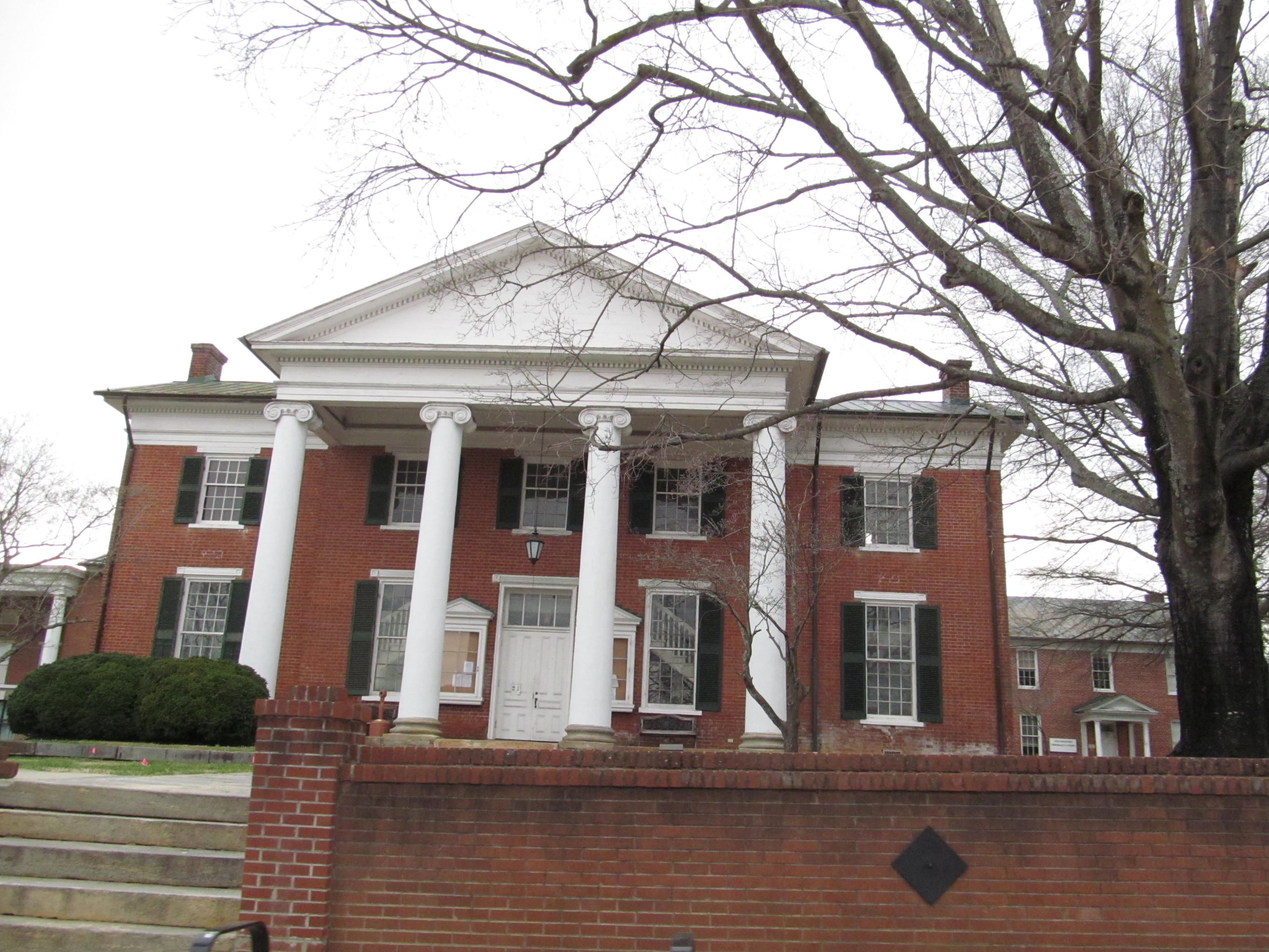 Halifax, Virginia